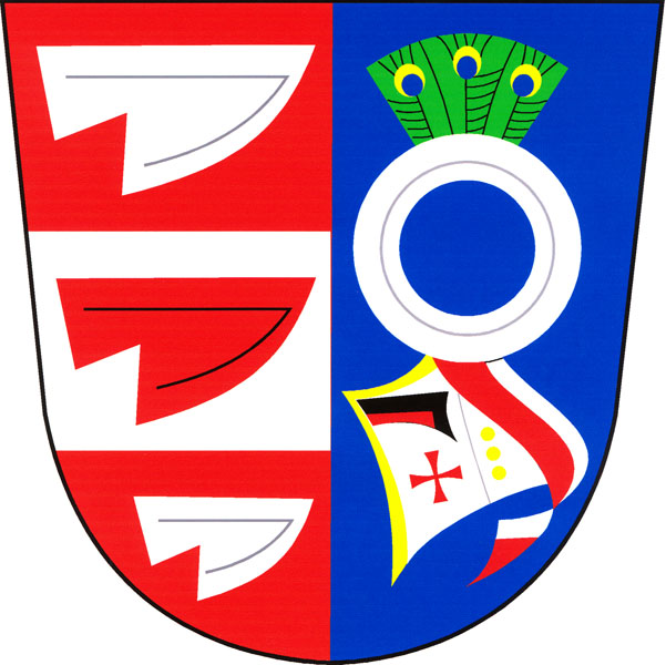 Znak obce Šelešovice